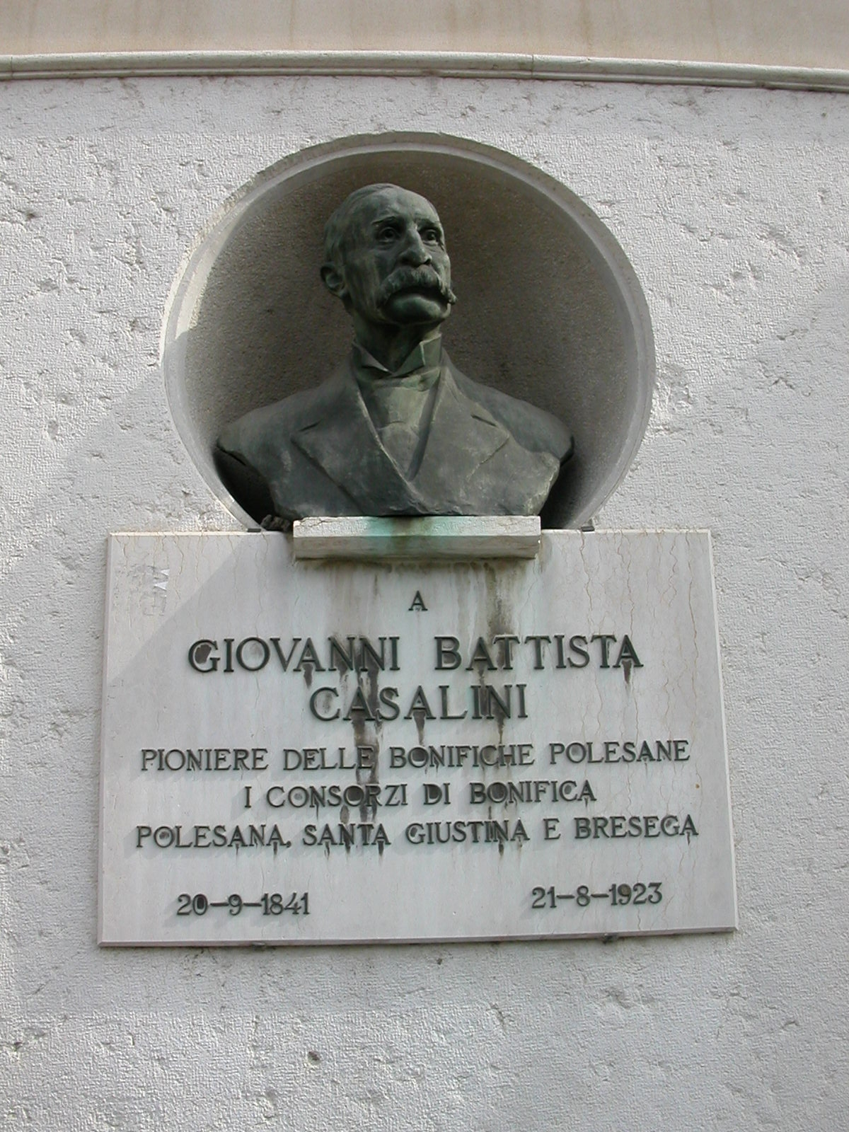 Busto commemorativo di Giovanni Battista Casalini posto sulla facciata del Palazzo Ravenna, Piazza Garibaldi, Rovigo.